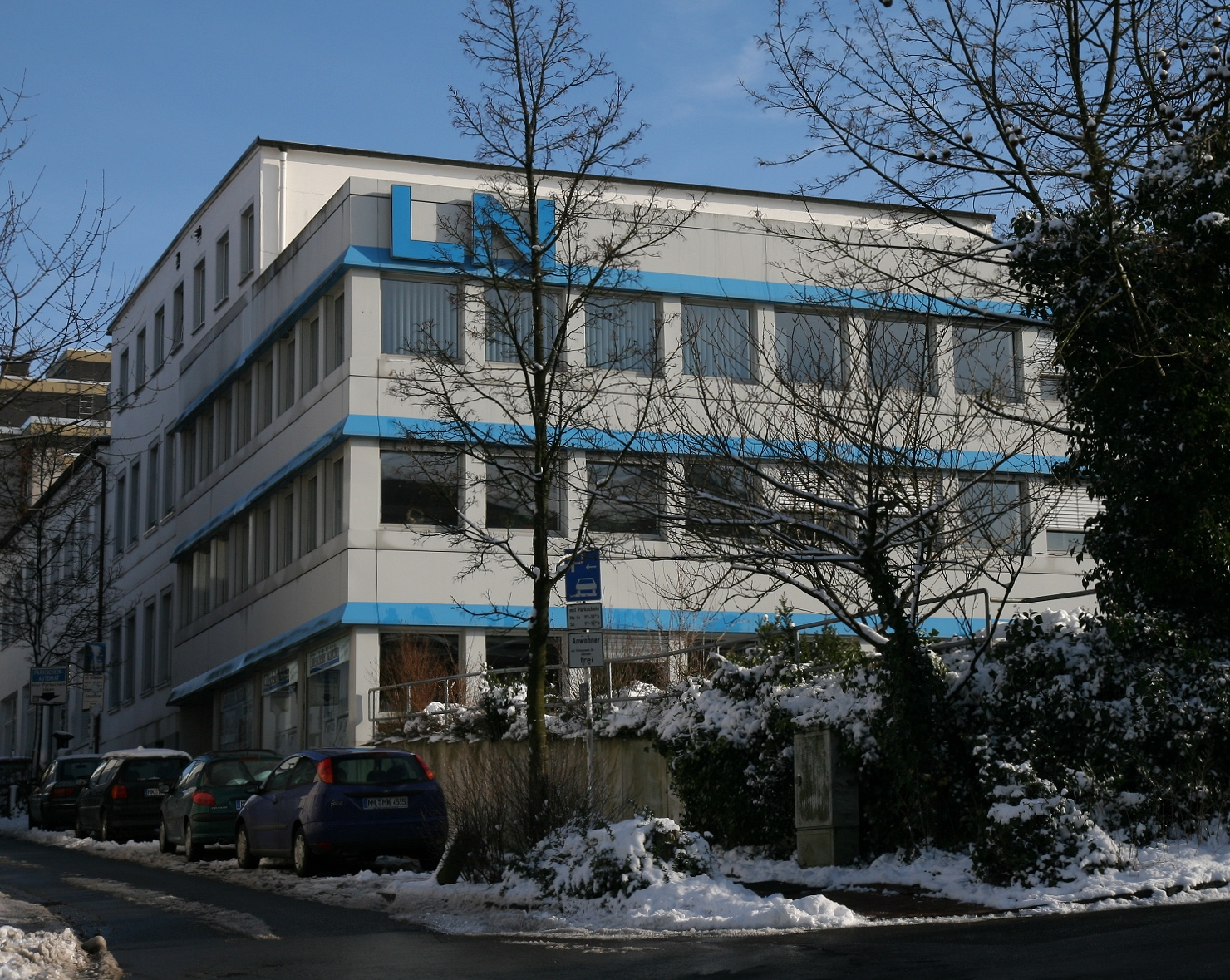 Gebäude der „Lüdenscheider Nachrichten“ in Lüdenscheid.